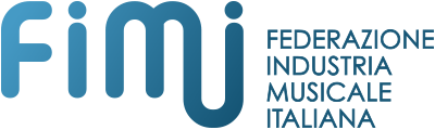 Logo der Federazione Industria Musicale Italiana